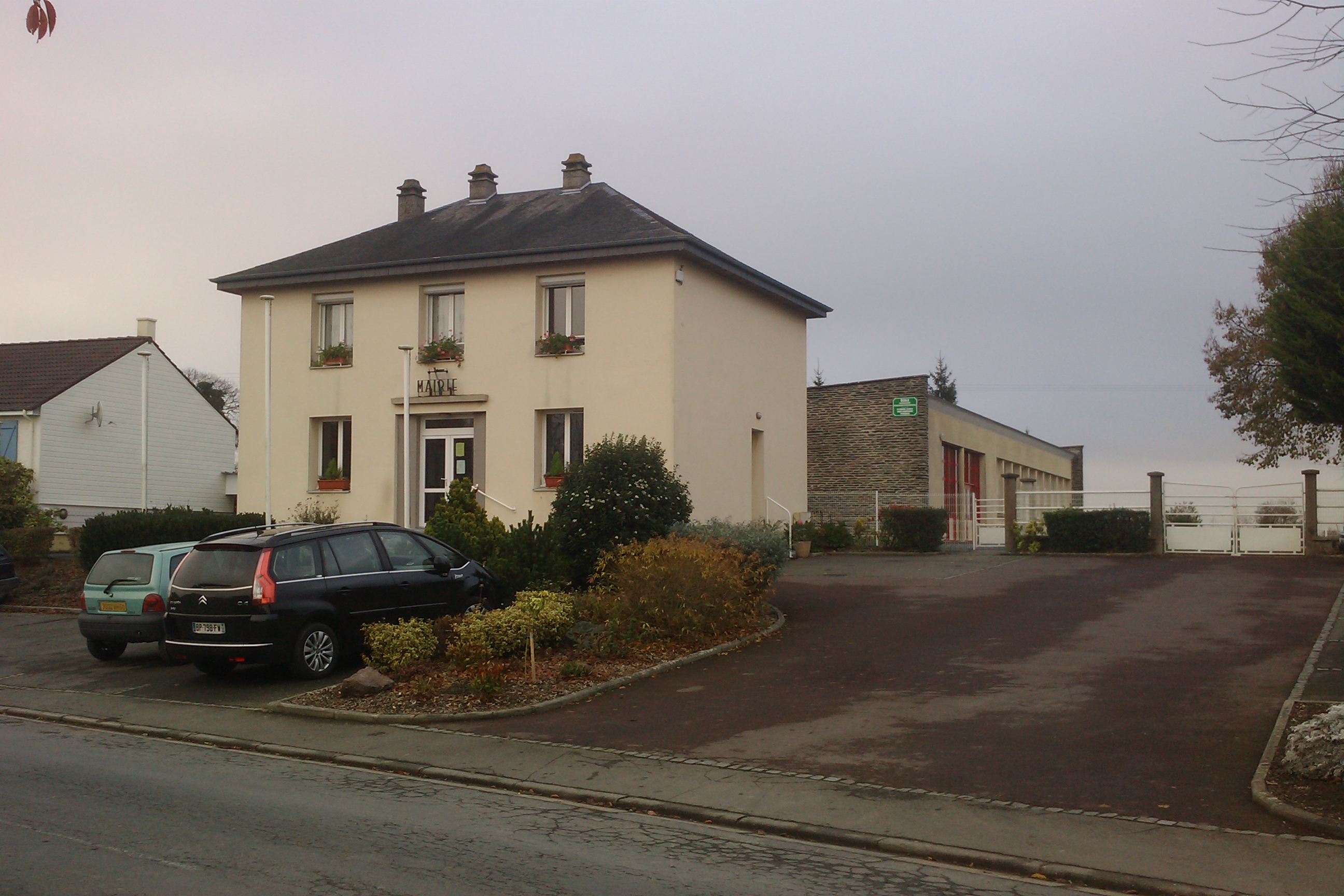 Mairie et école maternelle du Mesnil-Raoult